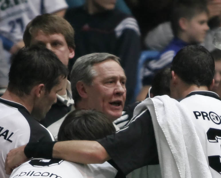 Zvonimir Serdarušic am 30. Dezember 2006 in der Aschaffenburger Unterfrankenhalle in der Auszeit des Spiels TV Großwallstadt - THW Kiel (25:30)